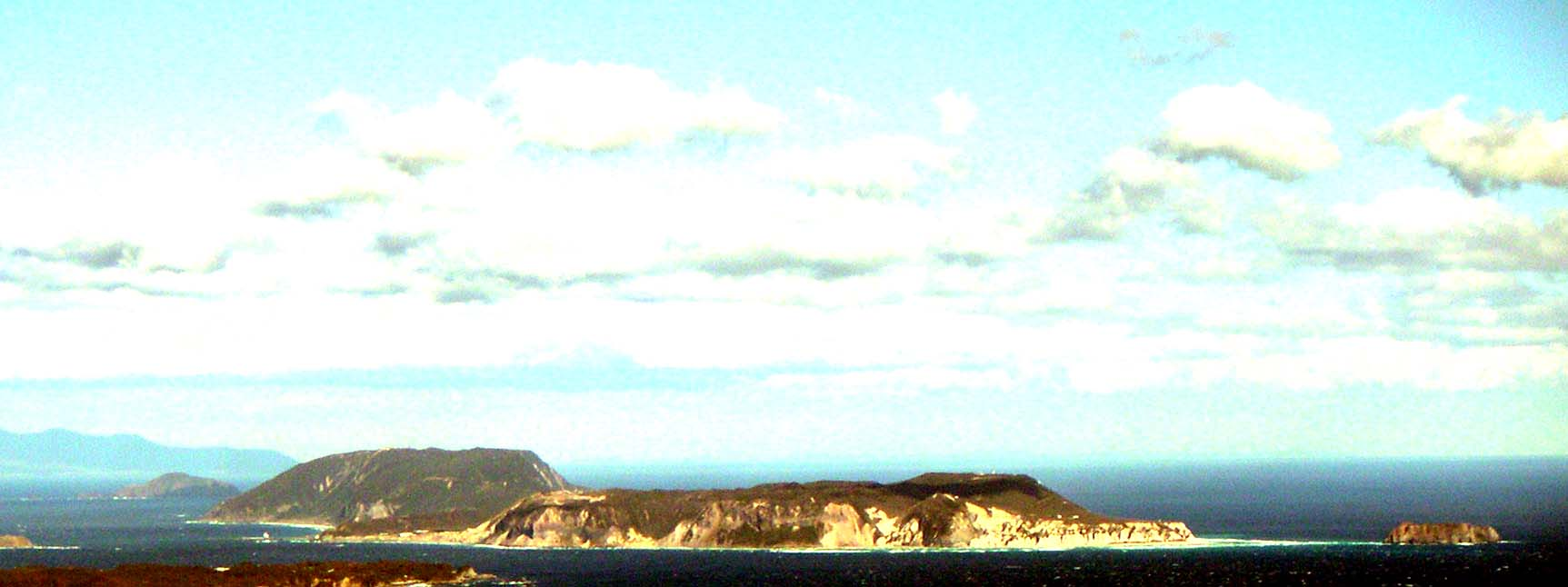 Niijima Island from Kozu Island, Tokyo, Jp